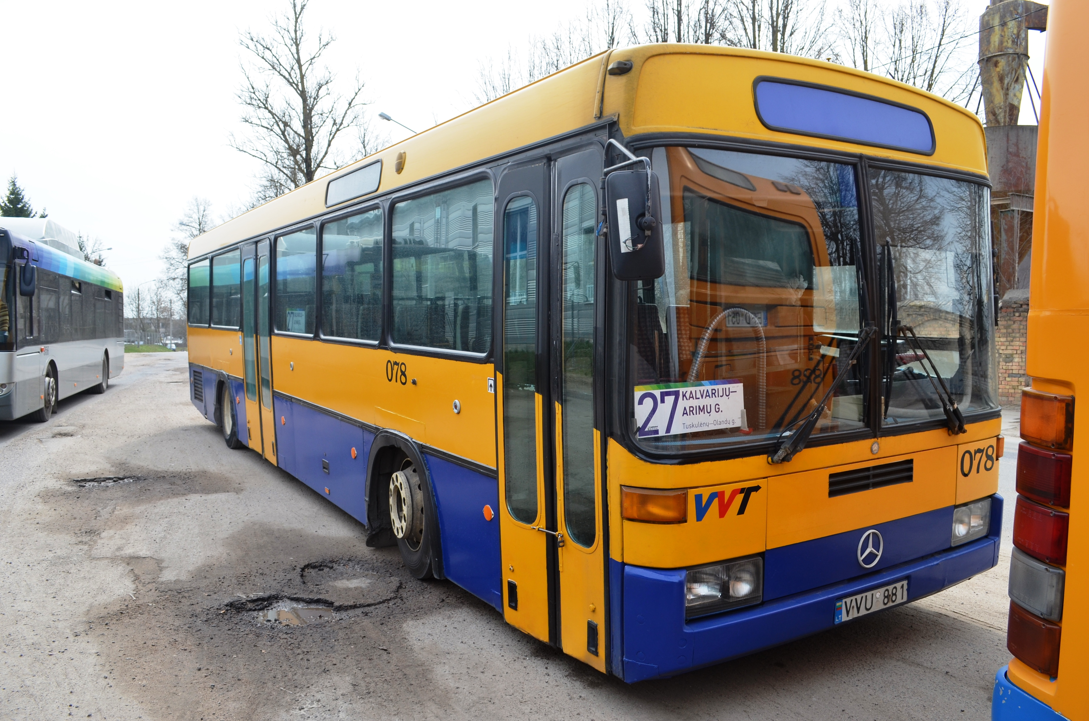 Ramseier & Jenzer autobusas, Arimų g. žiedas, Naujoji Vilnia, Vilnius. 27 maršrutas (Kalvarijų g.-Arimų g.)